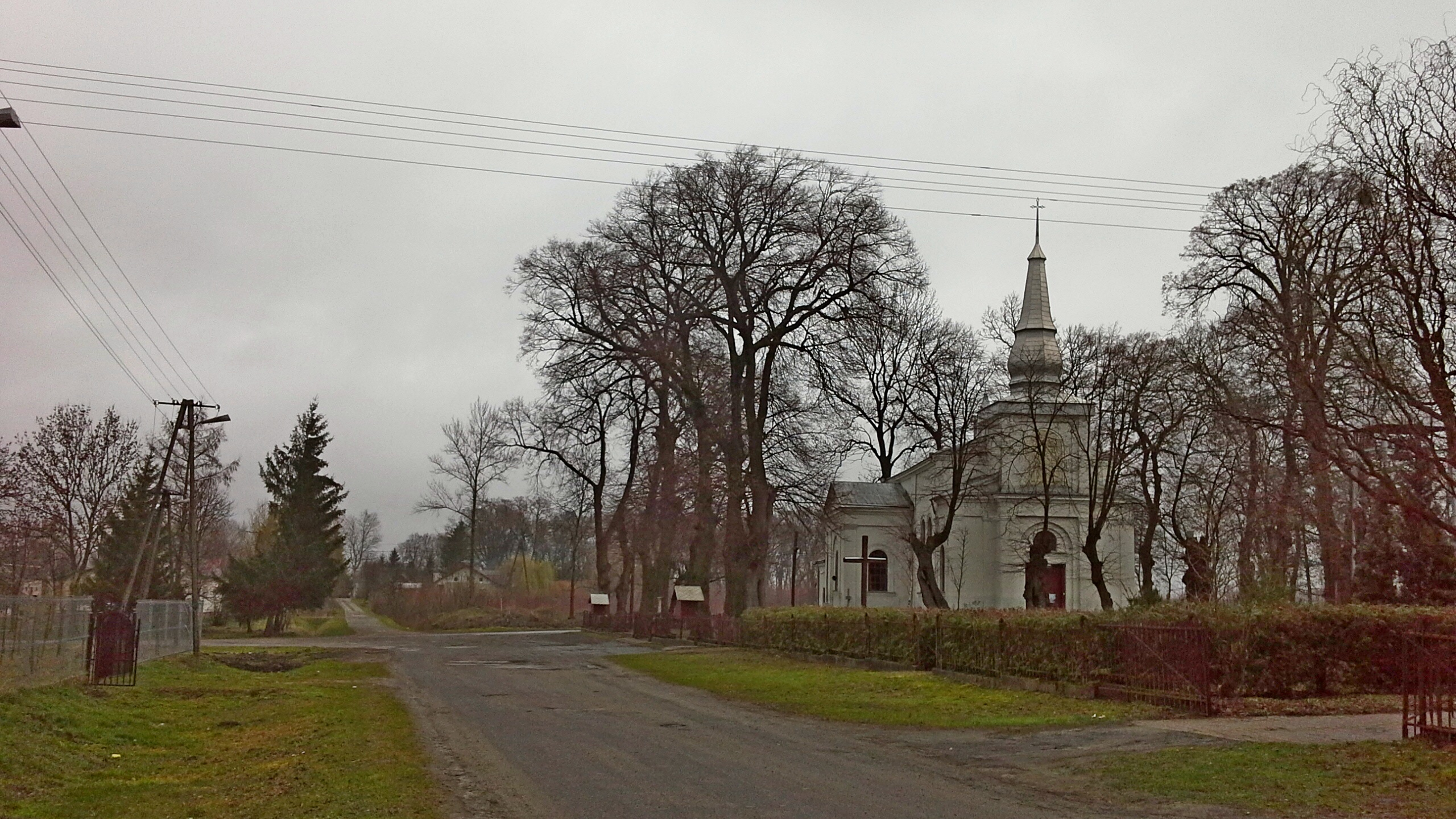 Centrum Sahrynia z dawną cerkwią (ob. kościół)